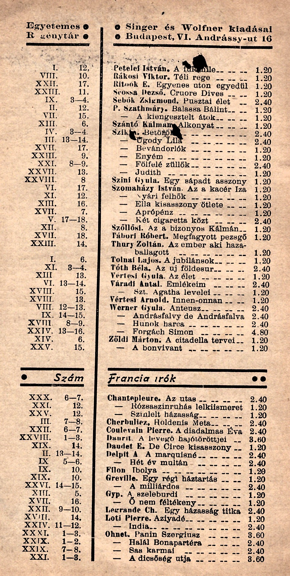 Az Egyetemes regénytár köteteinek jegyzéke (előzéklap Arthur Conan Doyle [1859-1930]: Napoleon [1911, Egyetemes regénytár] kiadásában)